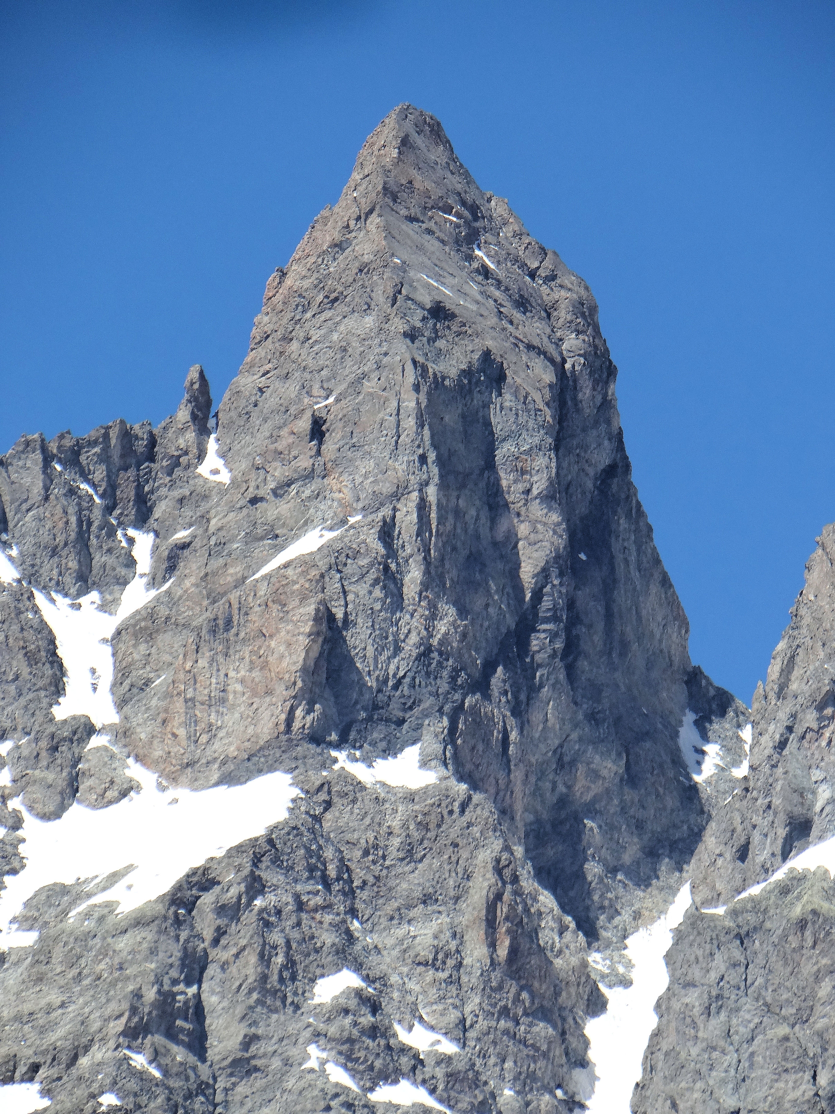 Pelvoux - Pré de Madame Carle - Le Fifre